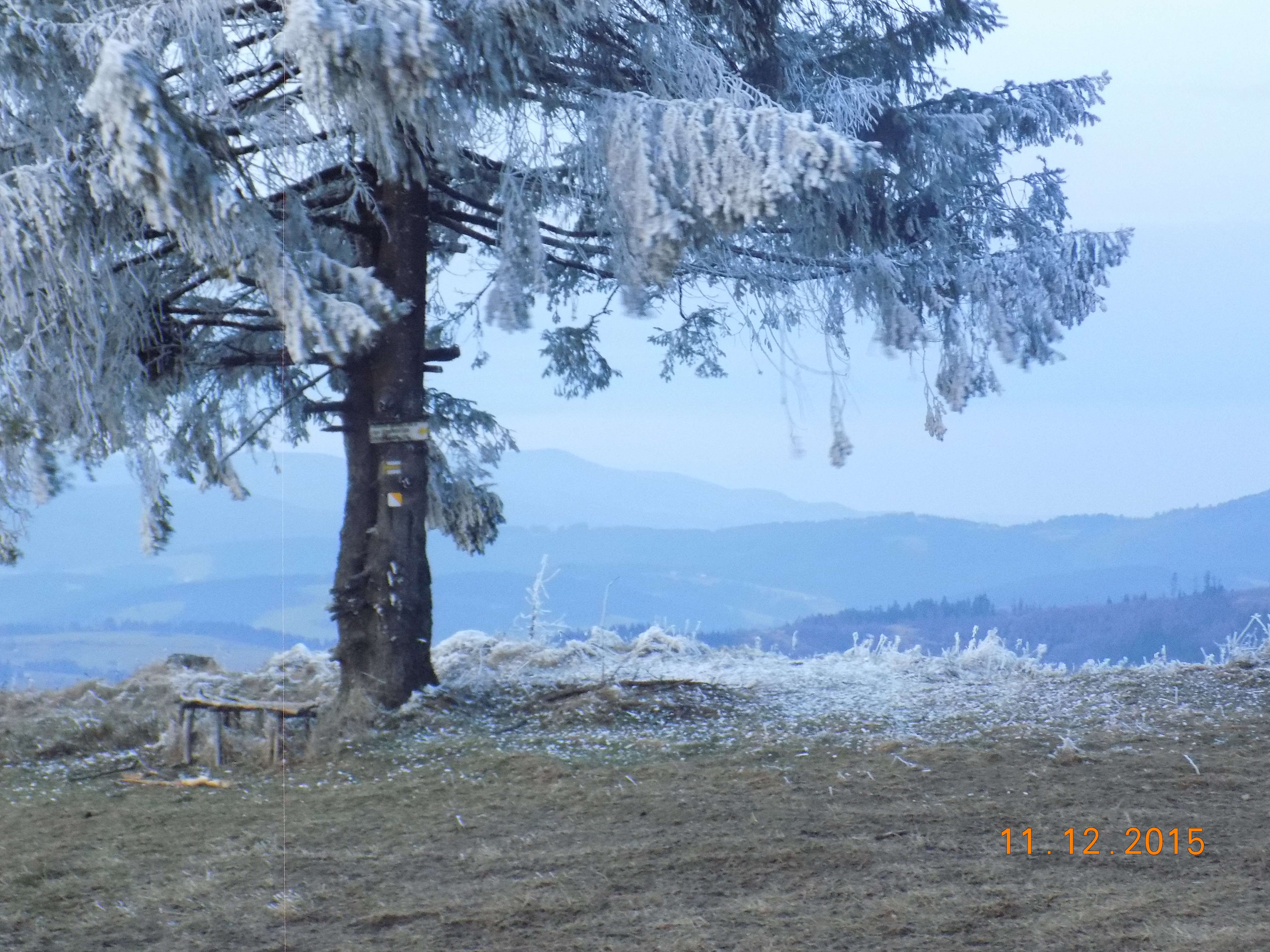 posedenie pod smrekom